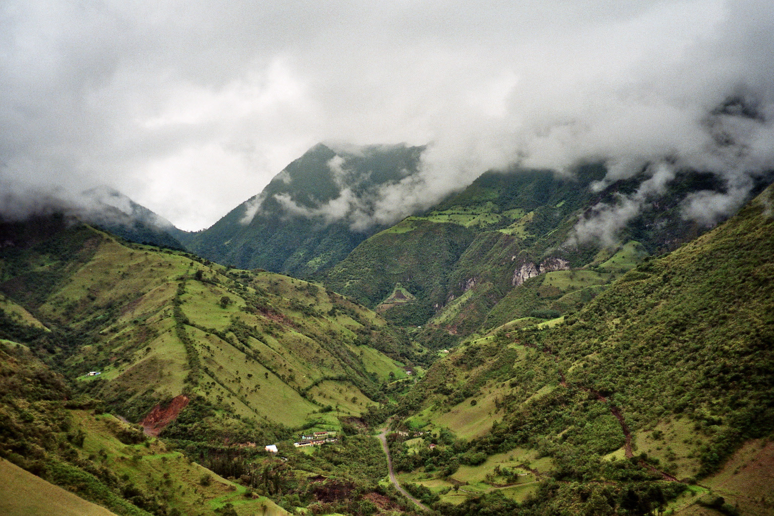 Cloud forest near Mindo, Ecuador